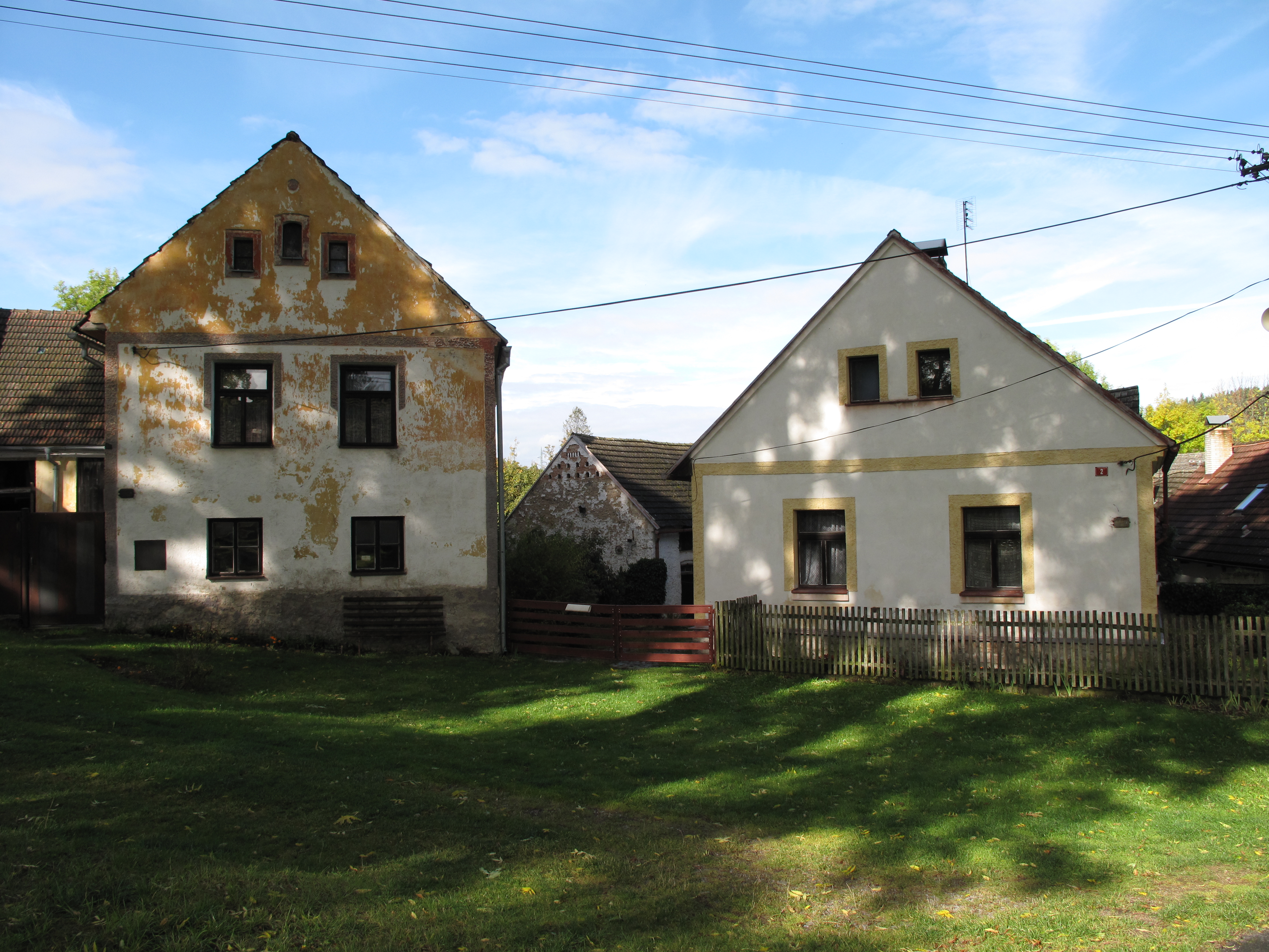 Lipová Lhota. Okres Klatovy, Česká republika.